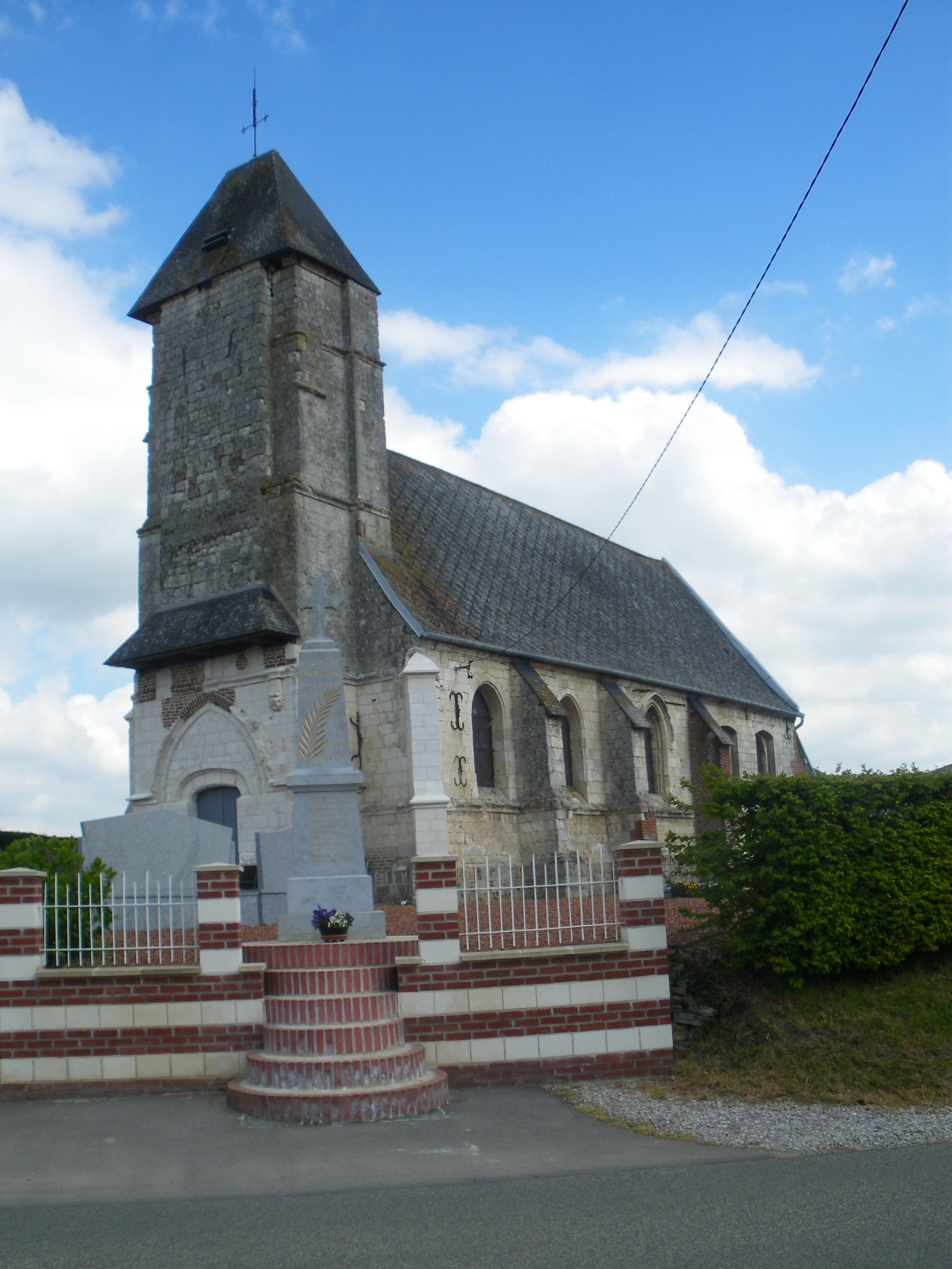 Vue de l'église Notre-Dame et du monument aux morts de Canettemont.